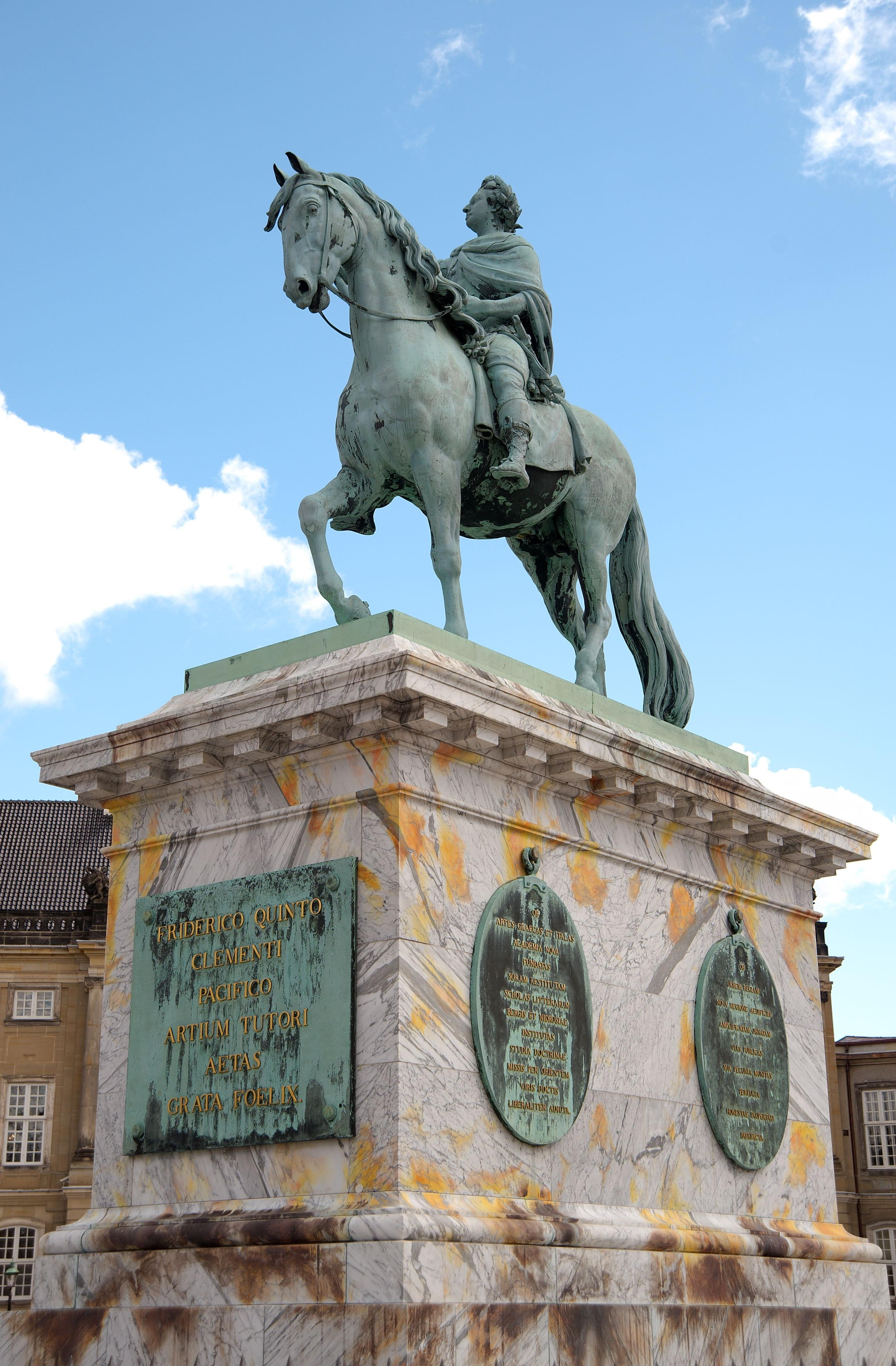 Salys Frederik V statue at Amalienborg Palace